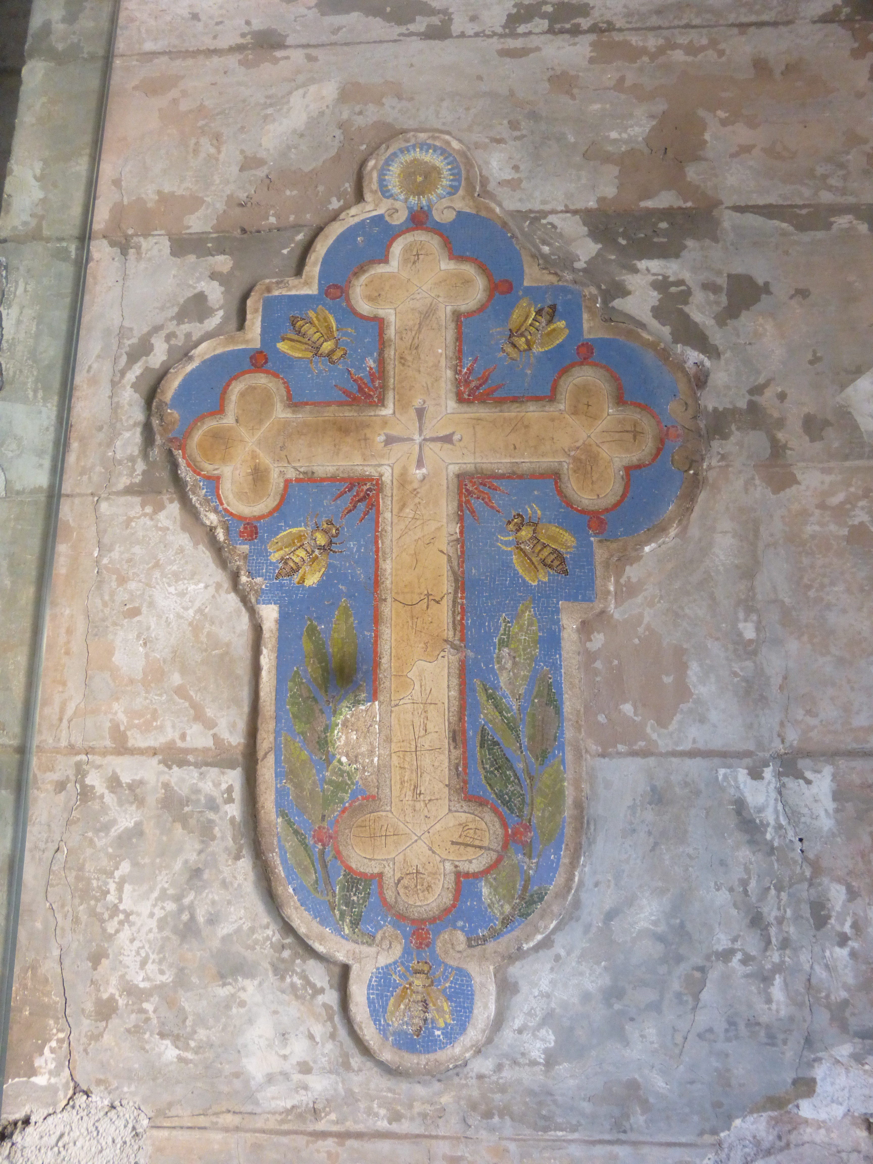 Roma, Santa maria in Cappella, croce con api e fronde d'olivo allo stipite destro. Attribuita al Borromini, che l'avrebbe fatta realizzare da Giovan Battista Calandra in micromosaico (mosaico filato) per il giubileo di Urbano VIII Barberini (1625) per la basilica di S. Pietro, come sigillo della porta santa alla chiusura del giubileo. Quando Innocenzo X Pamphilij riaprì la porta santa per il suo giubileo, nel 1649, ruppe simbolicamente il sigillo (sono ancora visibili le tracce del martello lungo il profilo del mosaico) e ne fece dono al cardinal nipote (nipote di donna Olimpia, Francesco Maidalchini), e per questa via il piccolo mosaico venne riposizionato sullo stipite della porta della chiesa, che costituiva la cappella privata del casino di donna Olimpia in Trastevere.